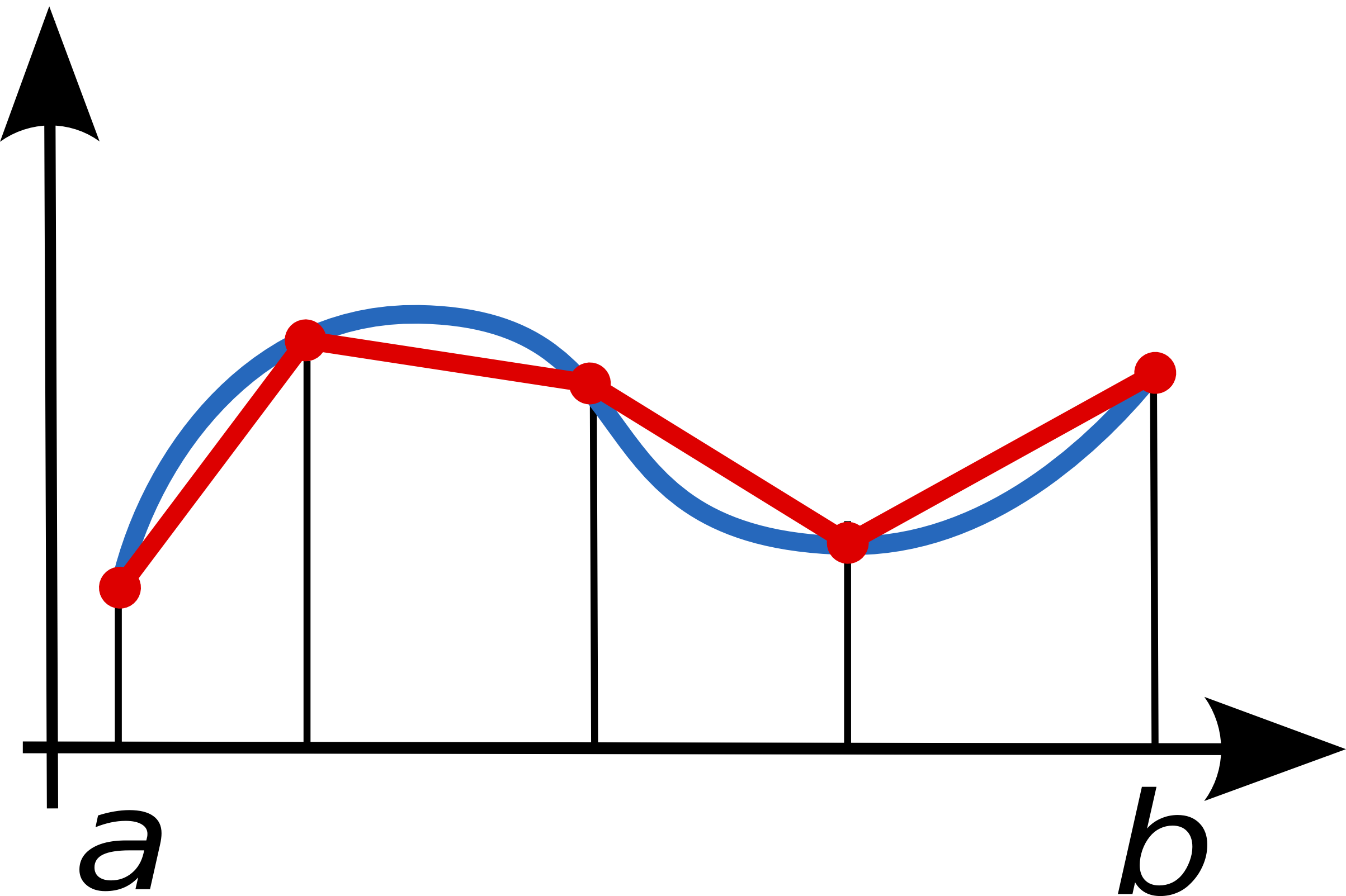 Composite trapezoidal rule illustration